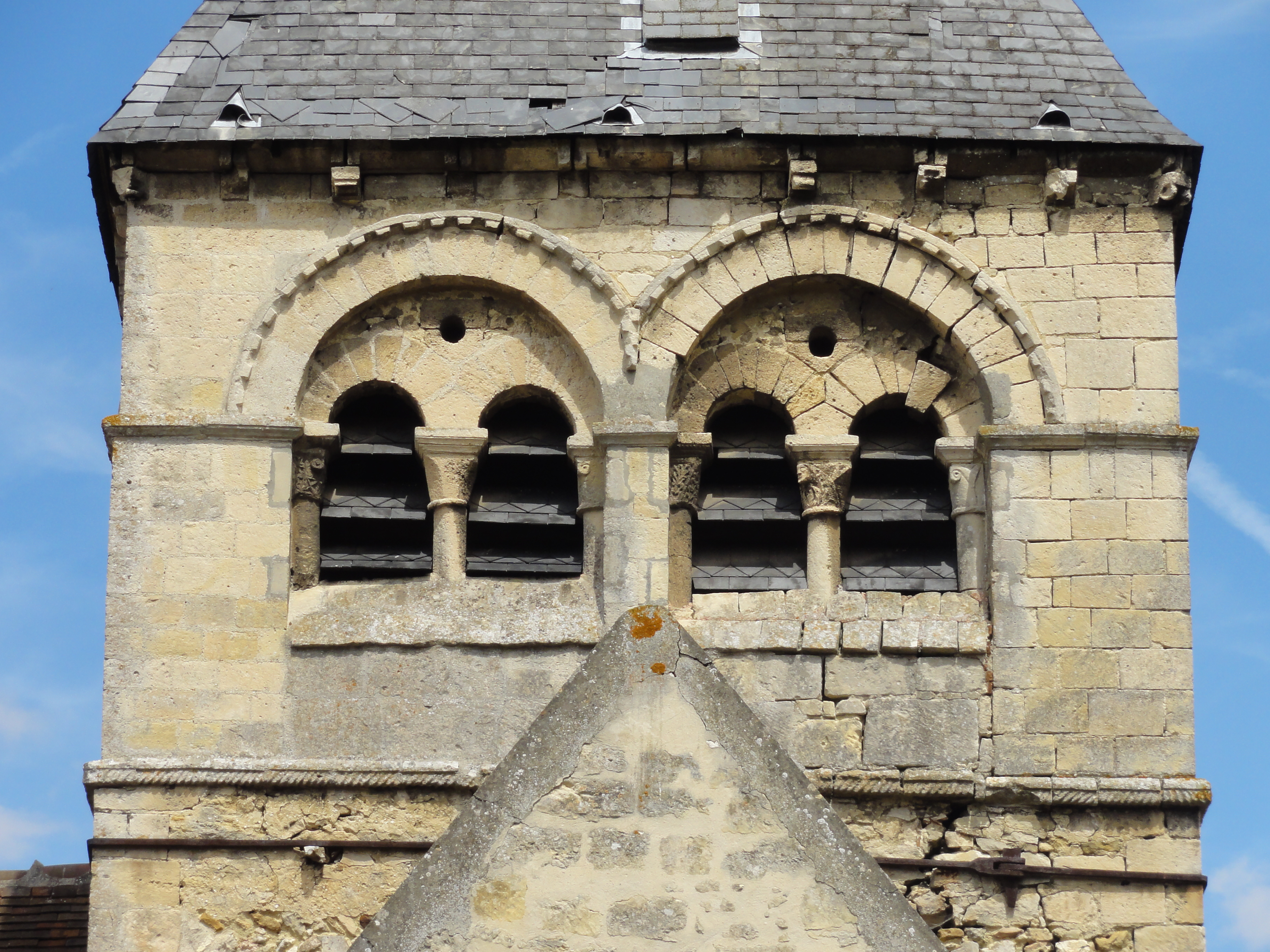 Église Saint-Michel-et-Saint-Vaast de Catenoy (voir titre).